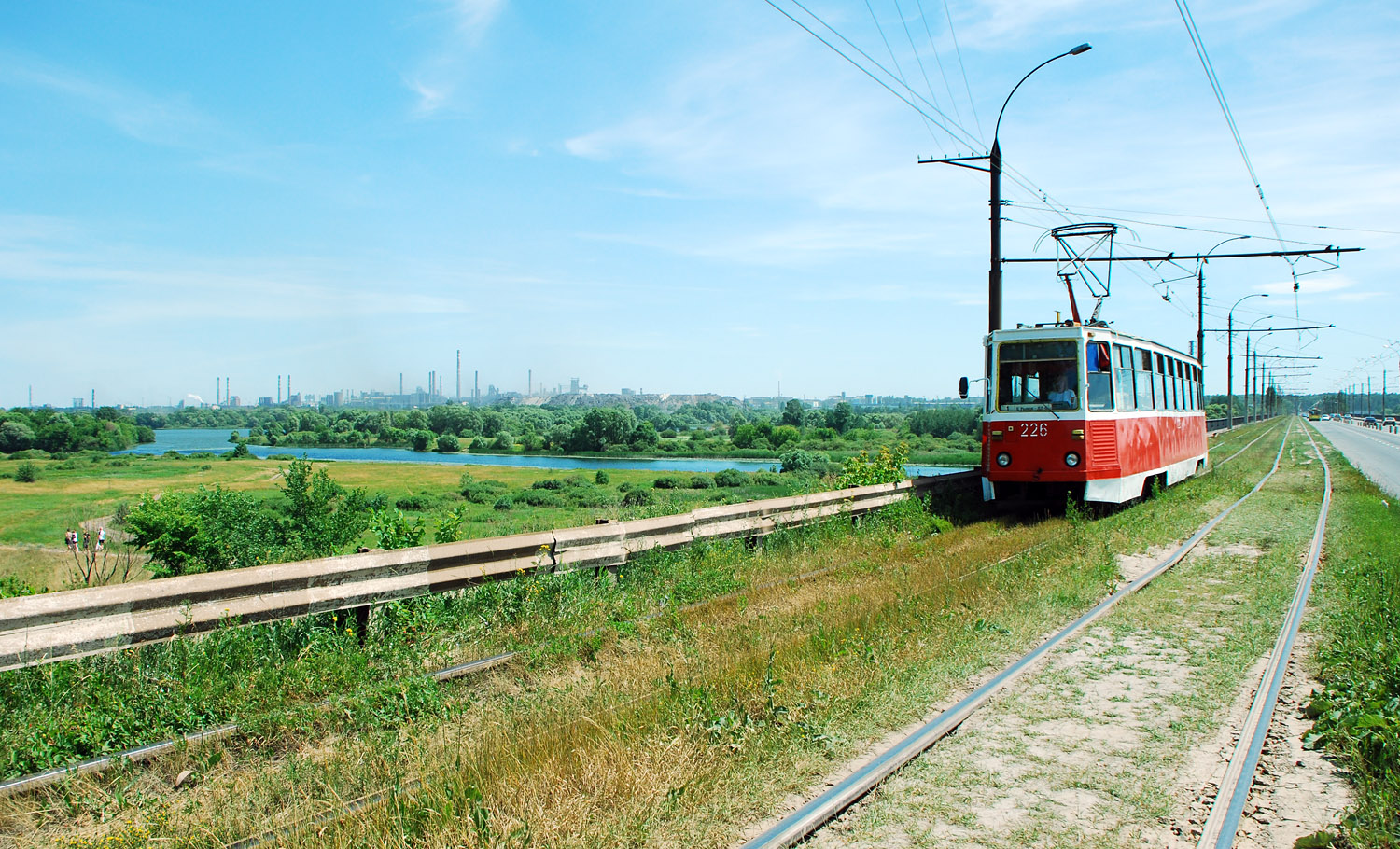 Липецкий трамвай на фоне реки Воронеж и промышленной зоны города на Октябрьском мосту.